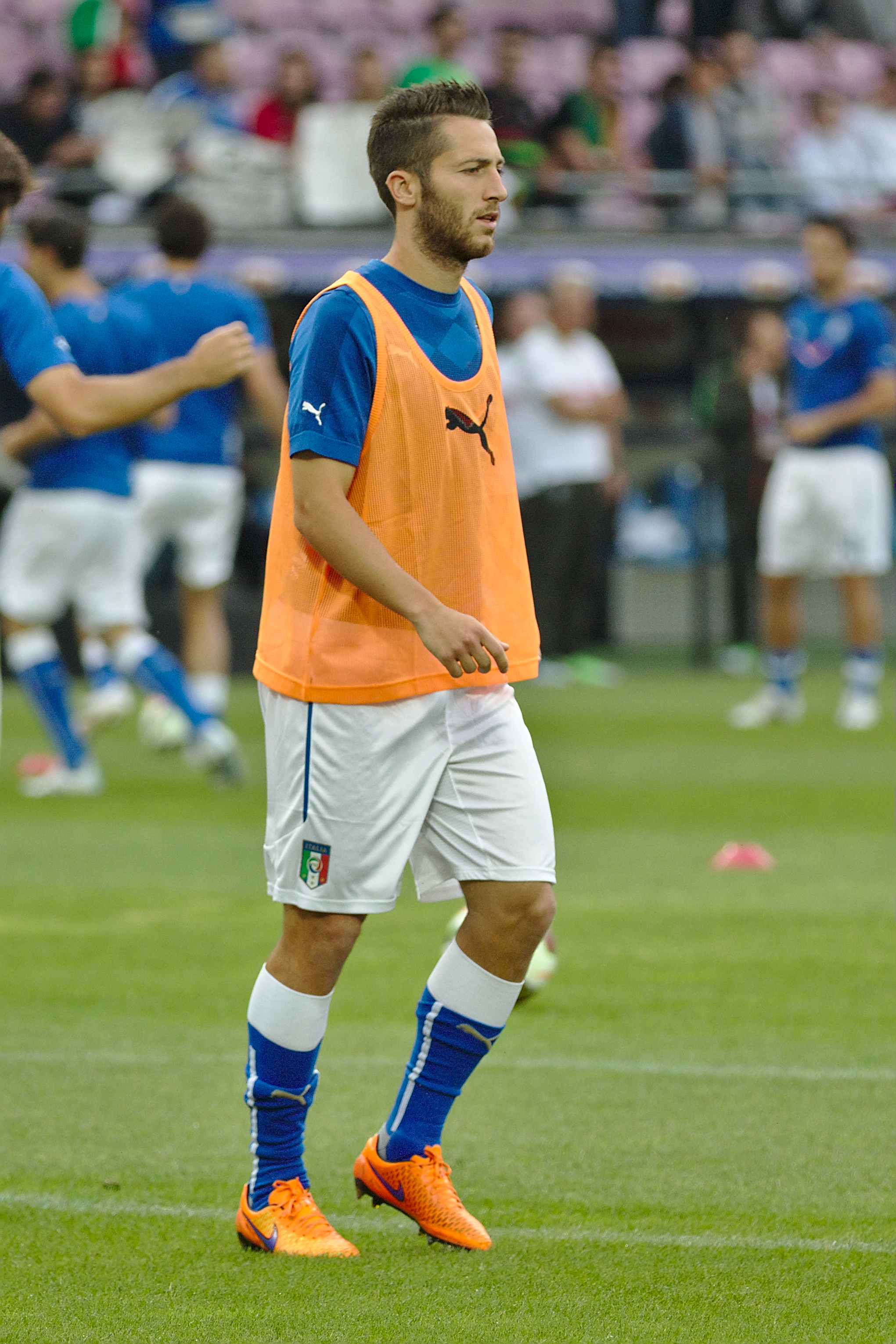 20150616 - Portugal - Italie - Genève - Andrea Bertolacci